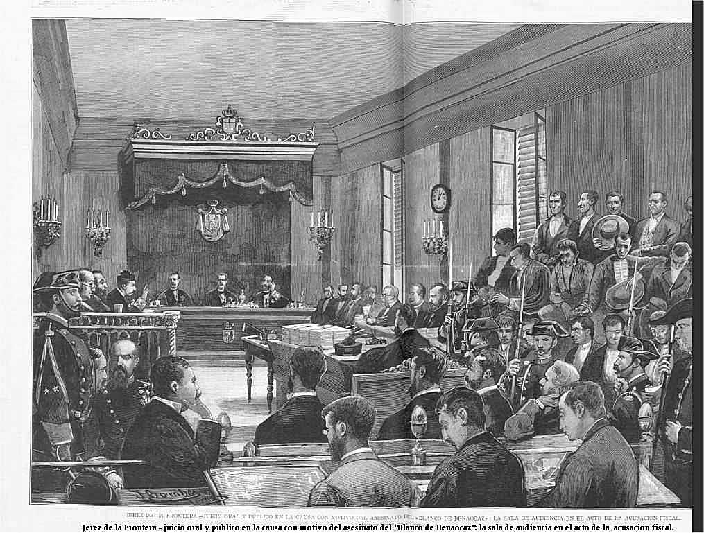 Jerez de la Frontera, sentenza nel processo per l'assassinio di Bartolomé Gago y Campos detto "el Blanco de Benaocaz", altrimenti noto come processo della "Mano Negra" - incisione di Juan Comba